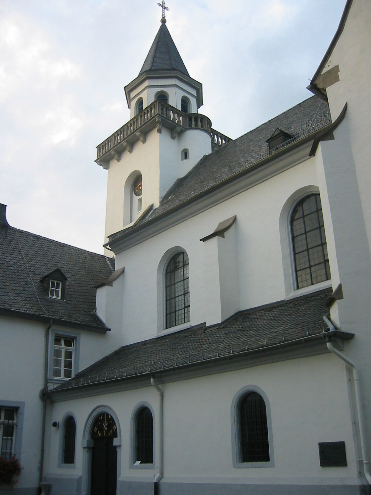 Kreuzberg Church, Bonn-Germany- Kreuzbergkirche